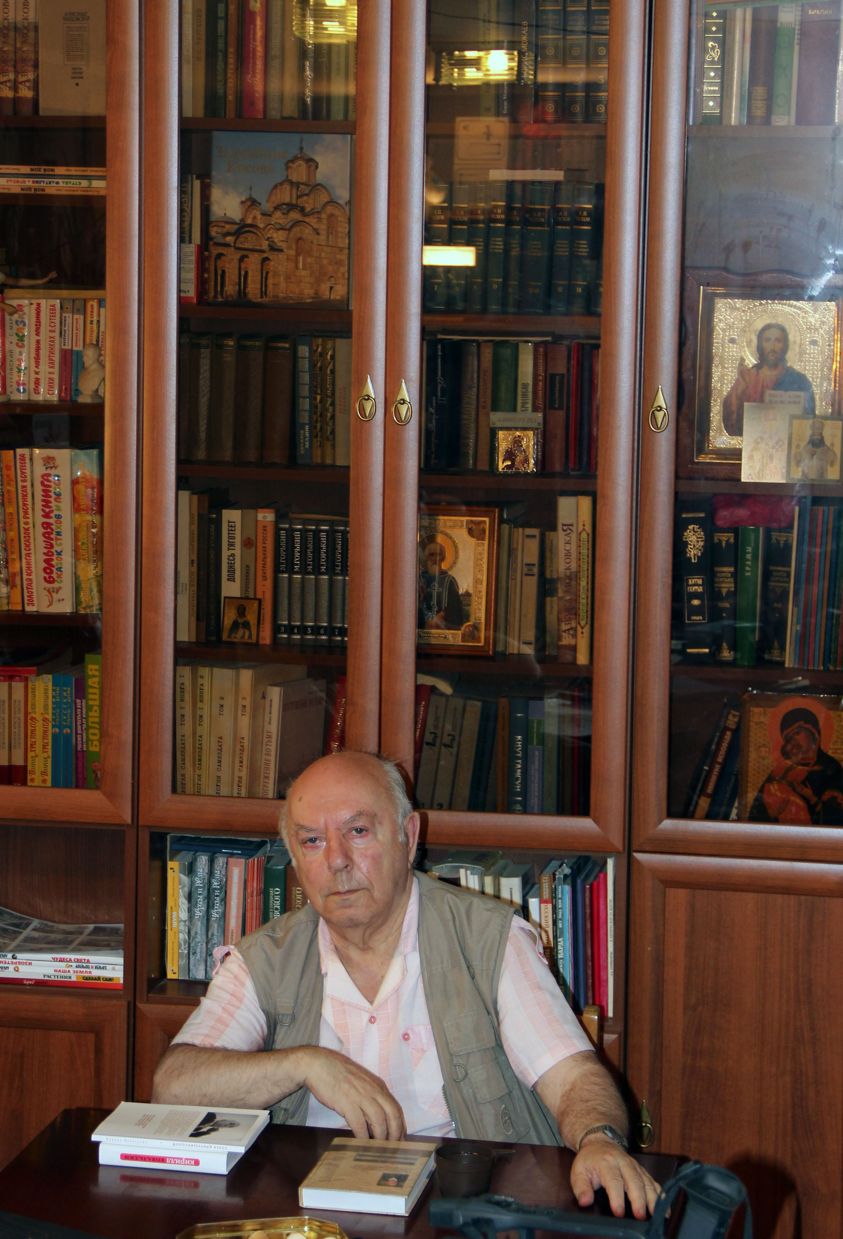 Кирилл Владимирович Ковальджи (род. 14 марта 1930) — русский поэт, прозаик, литературный критик и переводчик.